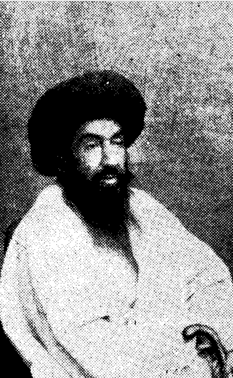 این عکس برای ان مدعیانی اپلود شد که میگفتند عمامه سفید بوده و با مونتاژ سیاه نشان دادند در ضمن این عکس از روی پی دی اف کتاب وحیدنامه اسکرین شات گرفته شده و از این عکس با کیفیت ترش هم موجود است